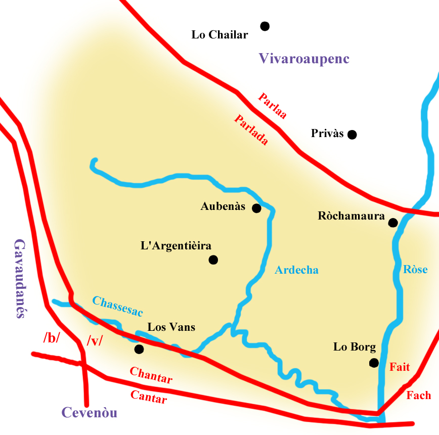 Lo parlar del bas-vivarés: isoglòsses màger qu'encastran aquel parlar.